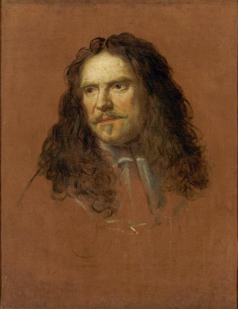 Portrait of Maréchal de France Henri de la Tour d'Auvergne, vicomte de Turenne (1611—1675); oil on canvas. The original is located in the Musée du château in Versailles (67 x 52cm).